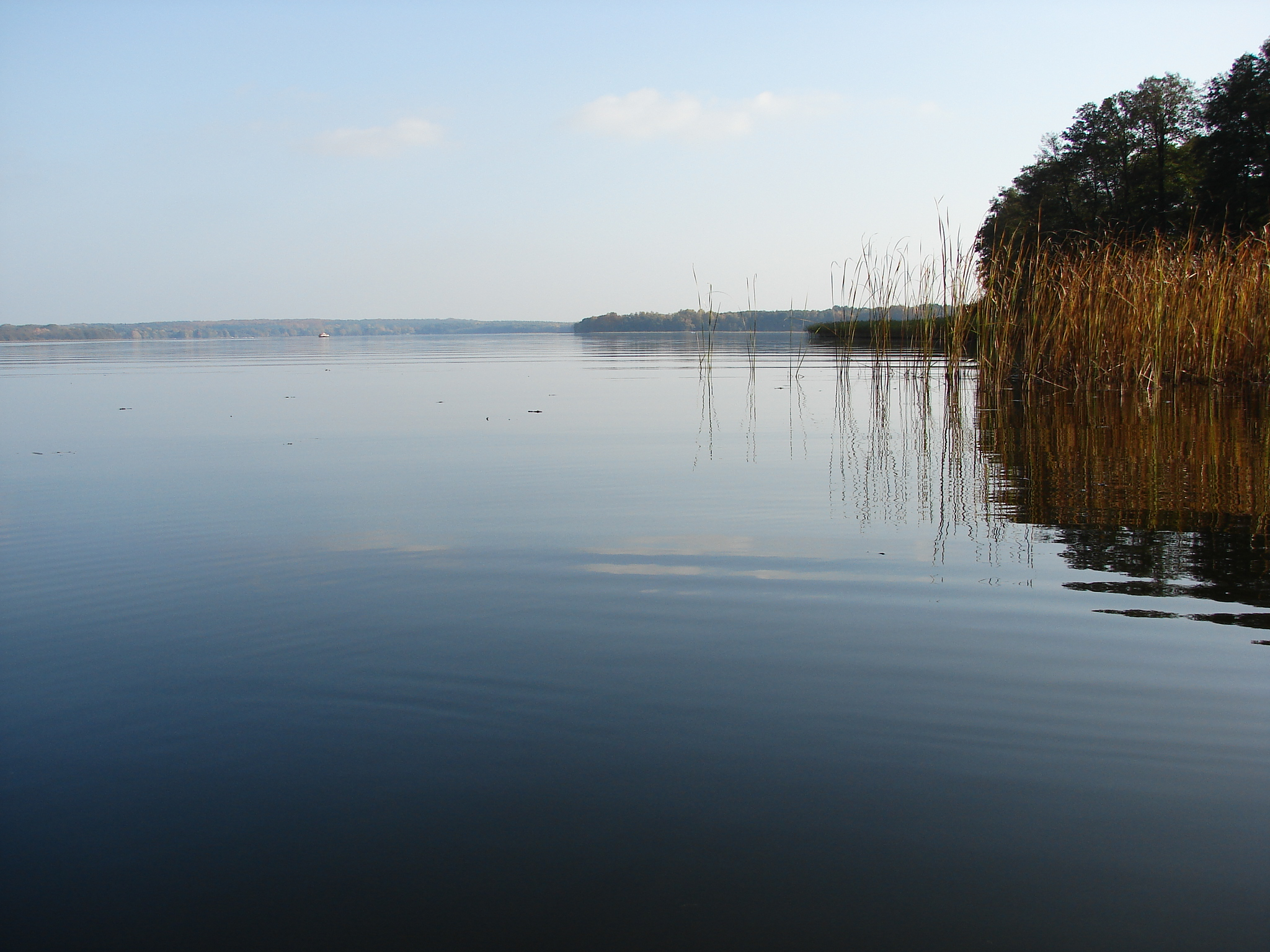 Stolpsee